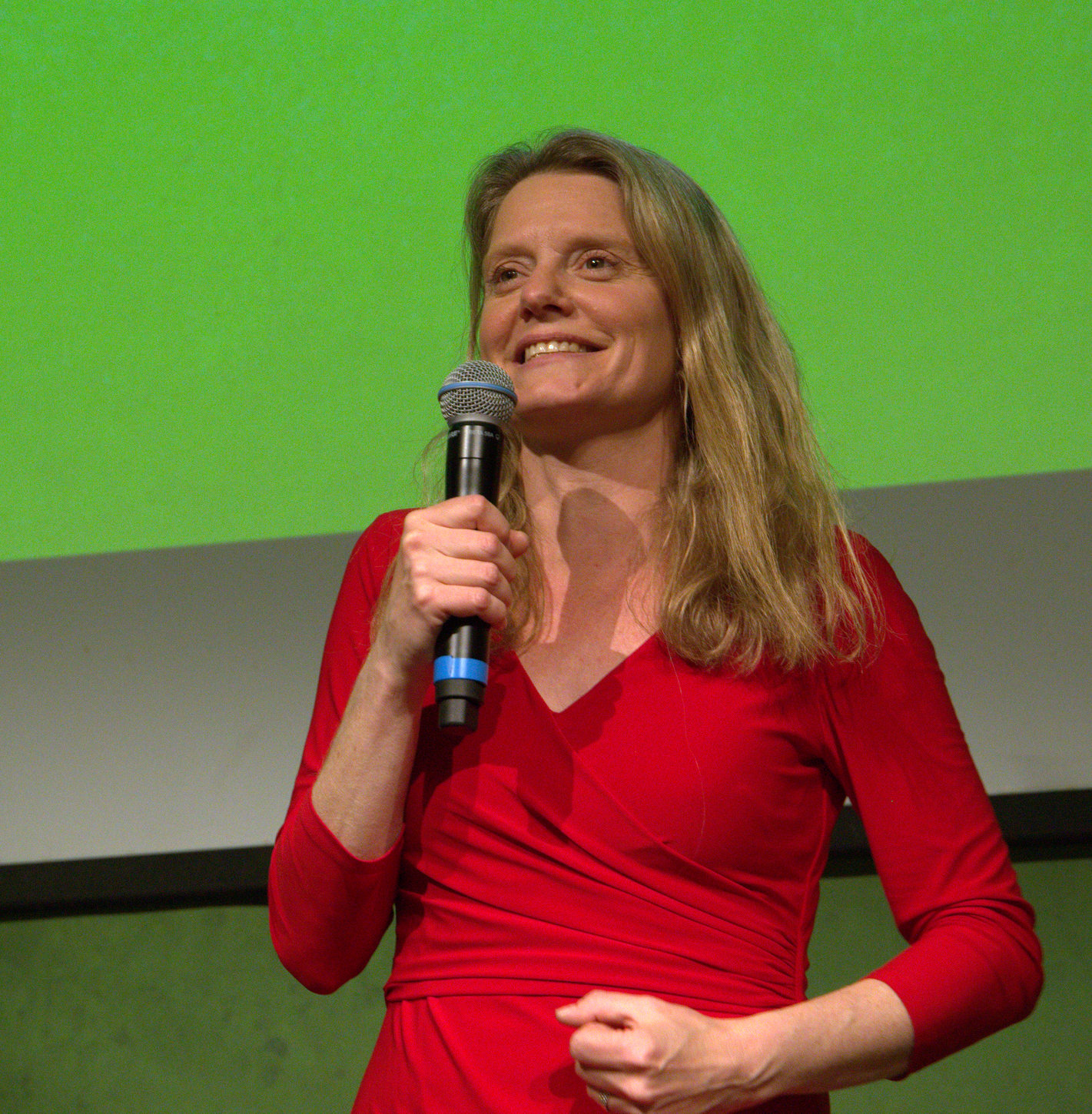 Henrike Hahn, Politikwissenschaftlerin und Politikerin (Bündnis90/Die Grünen). Hier während der Wahlparty zur Europawahl der bayerischen Grünen am 26.05.2019.